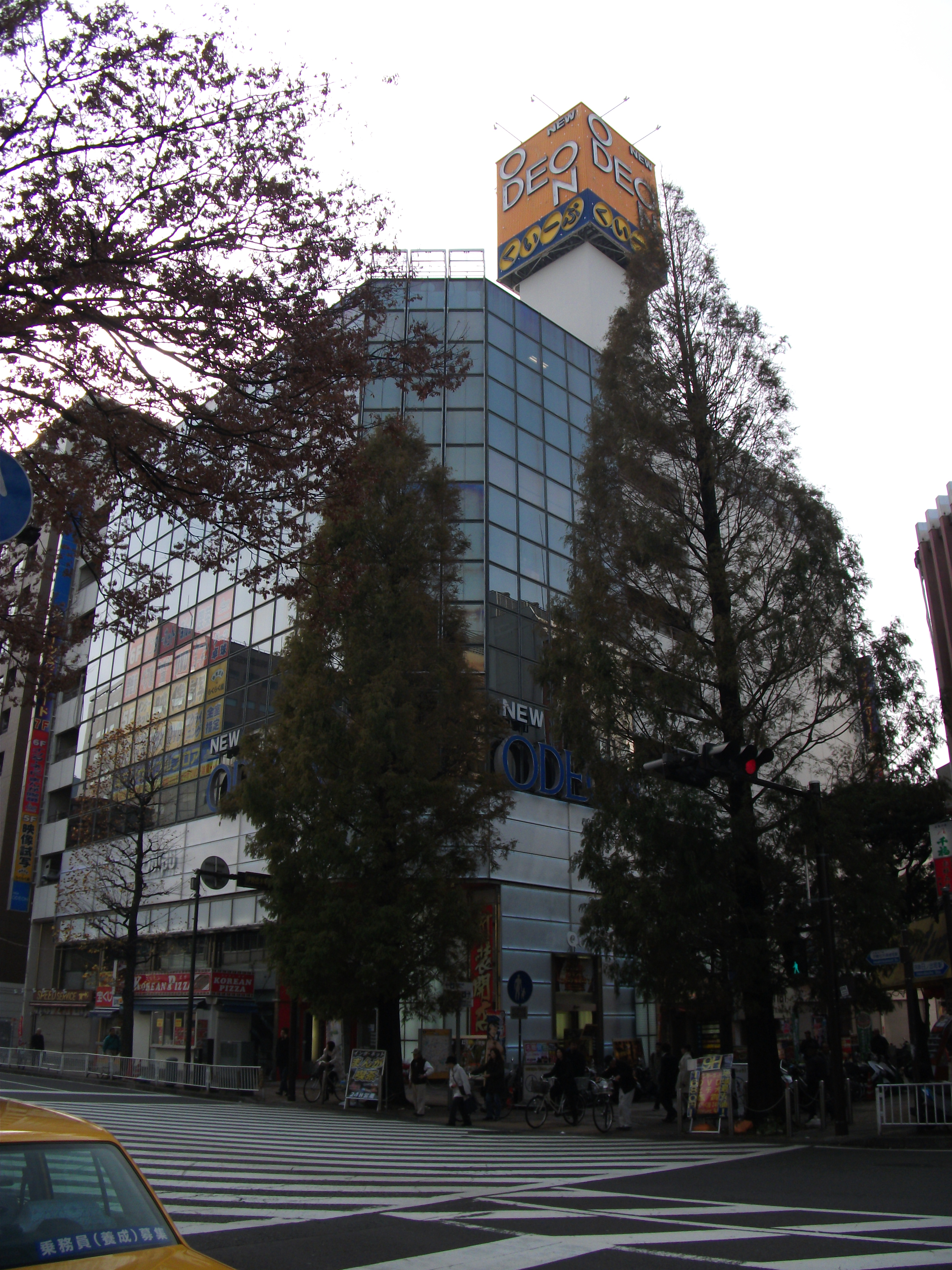 横浜市中区長者町、ニューオデヲンビル